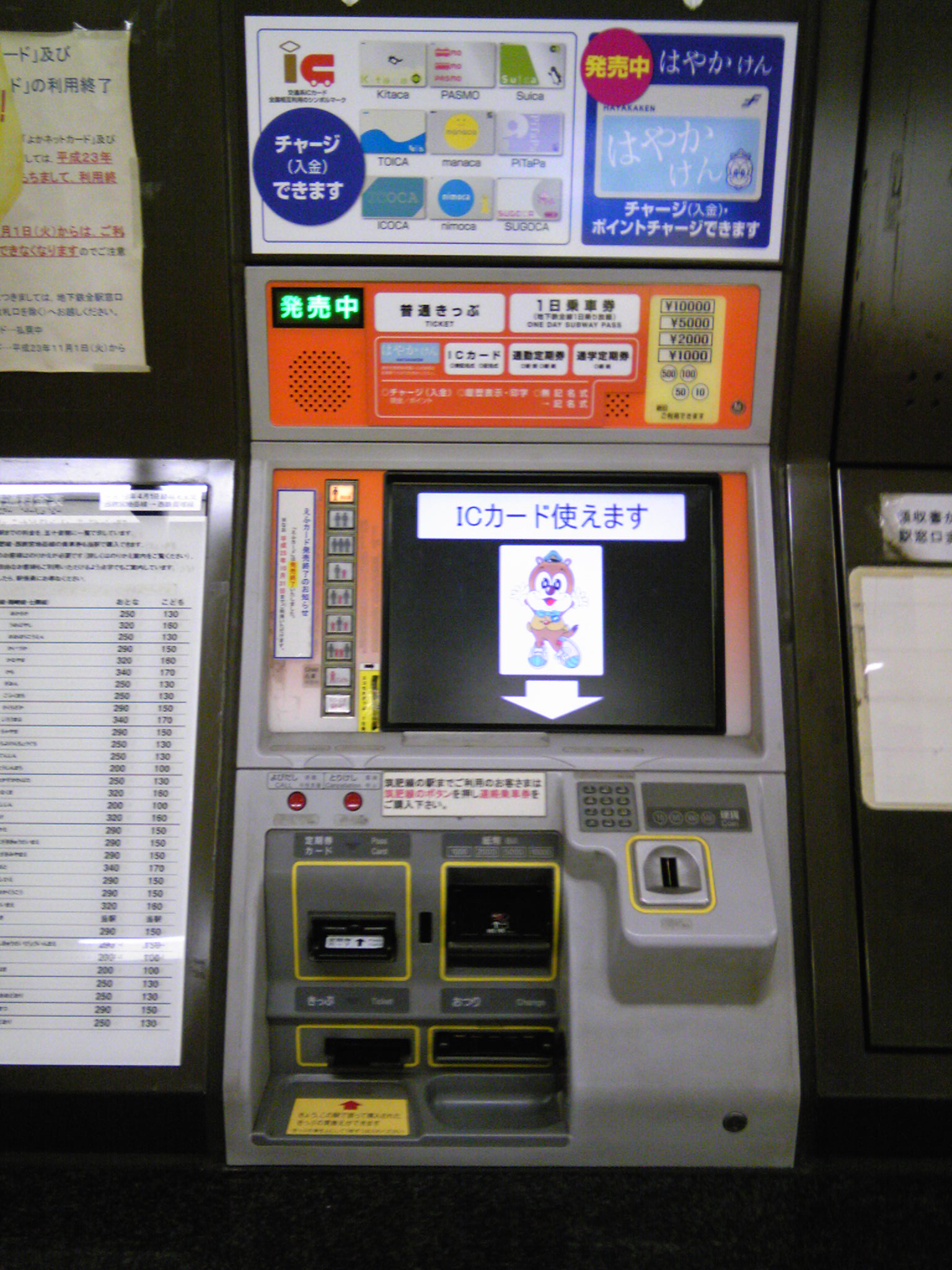 ICカード対応の自動券売機 福岡市地下鉄藤崎駅（福岡市早良区）